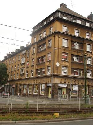 Wohnhaus der Heinrich Feldhoff Stiftung